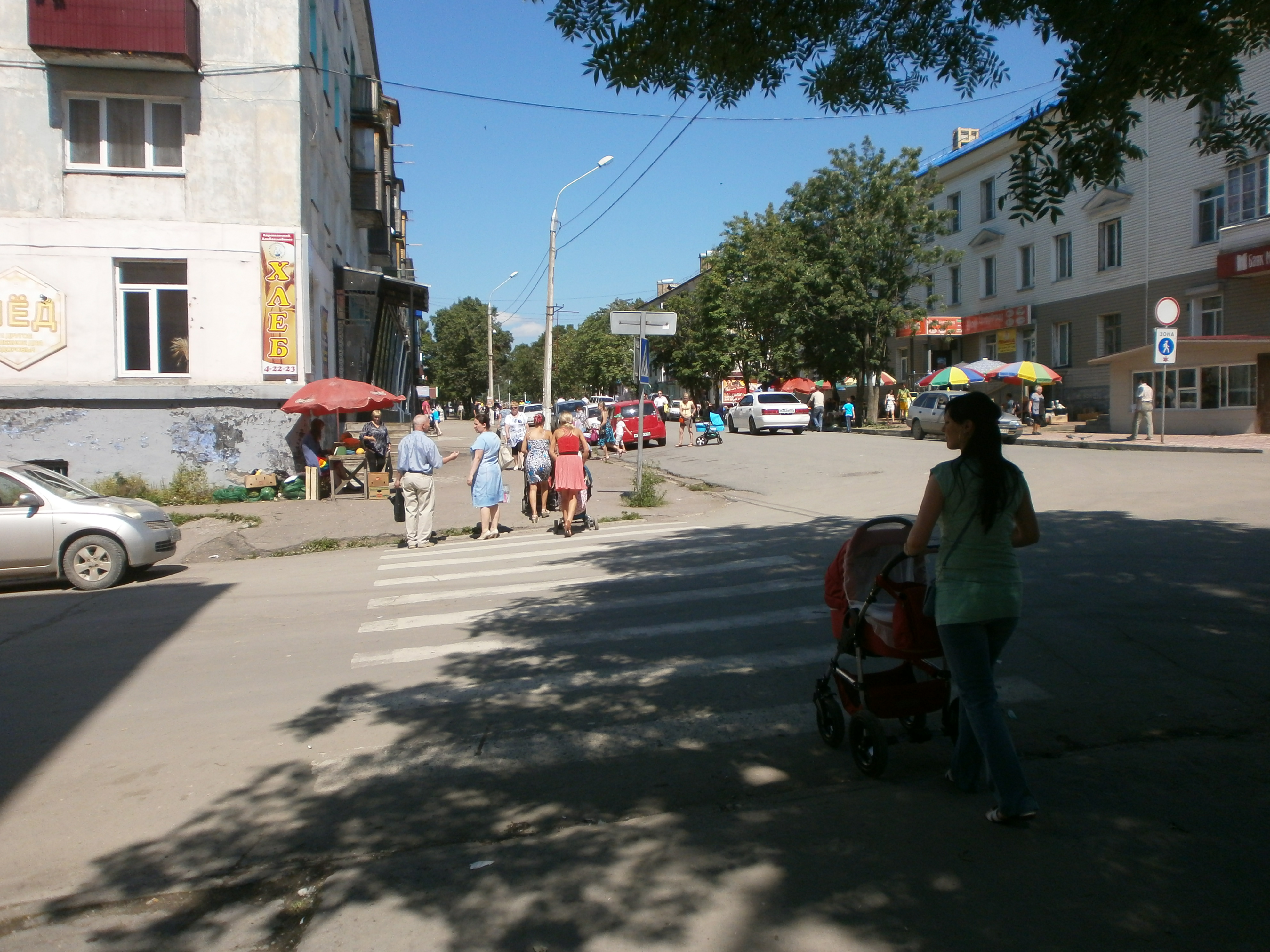 コルサコフ市街。投稿者本人による撮影。